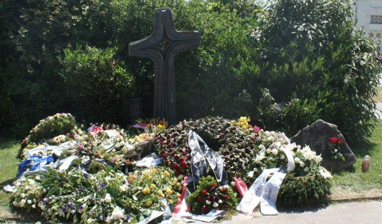 Grab Elfriede Ott-Wiener Zentralfriedhof